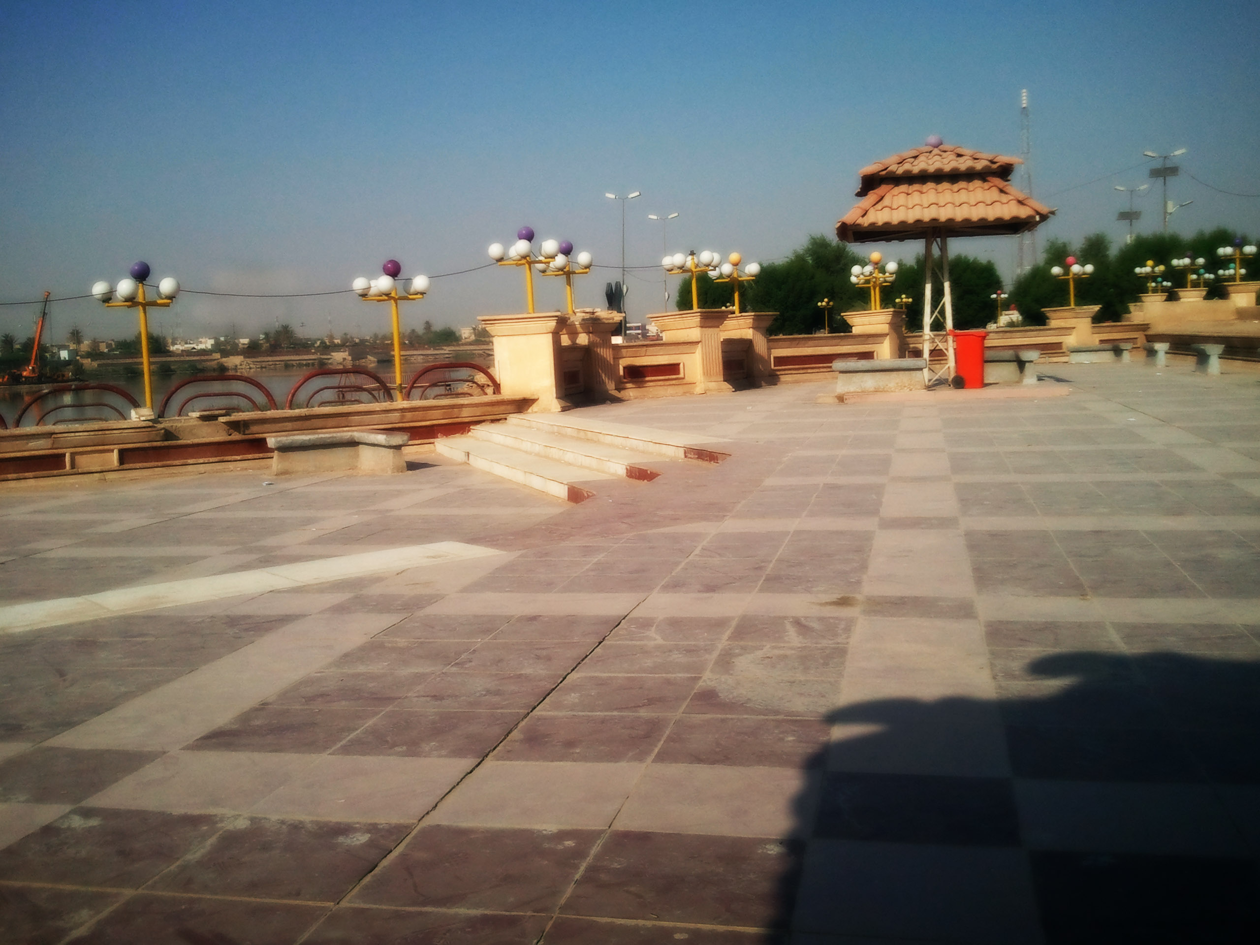 کورنیش الناصریه